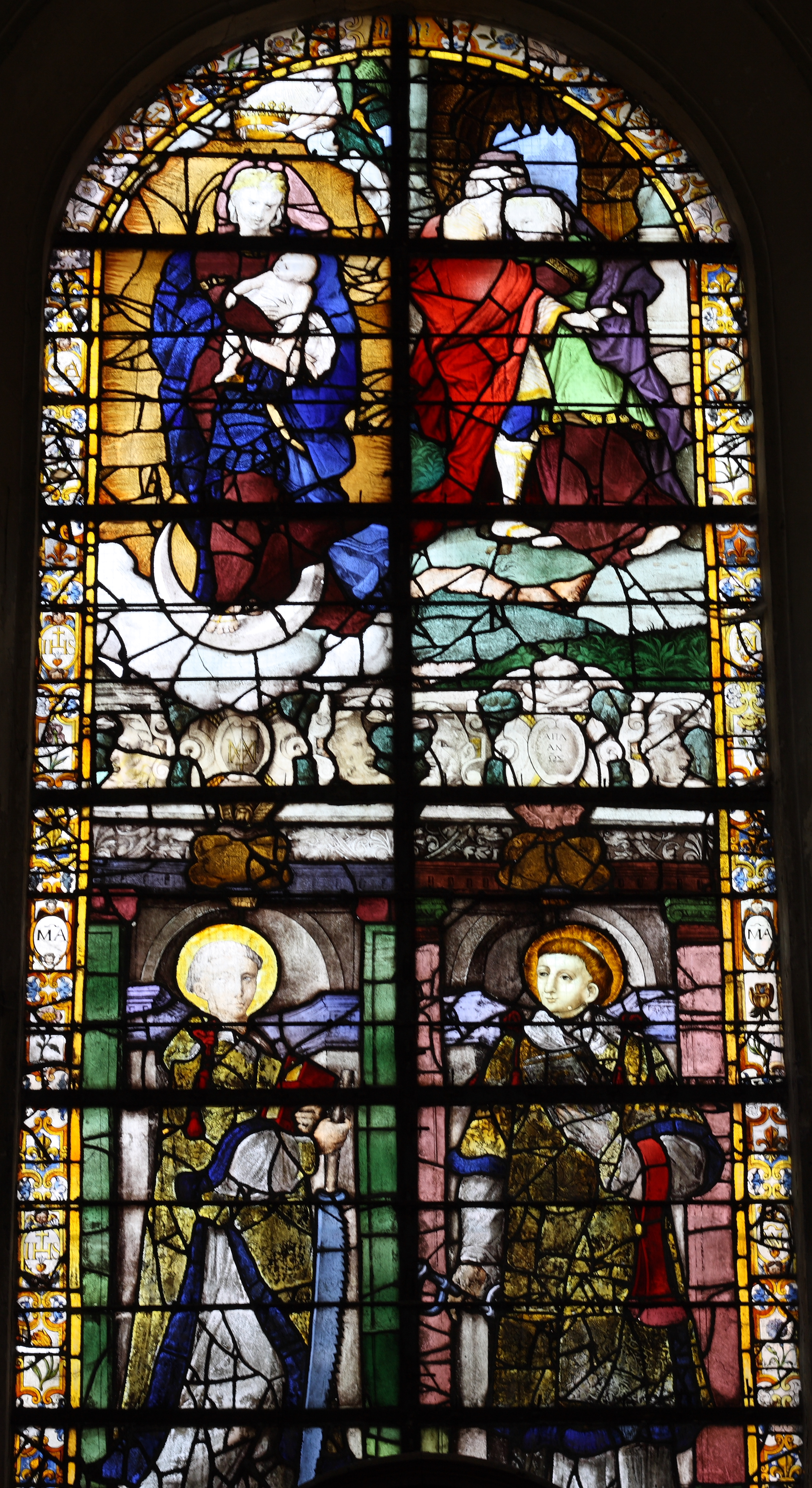 Ausschnitt des Bleiglasfensters Nr. 11 in der katholischen Pfarrkirche Saint-Acceul in Écouen (siehe Mathieu Lours: Saint-Acceul d'Écouen. Une cage de verre en pays de France, éditée par l’Association Les Amis de Saint-Acceul)